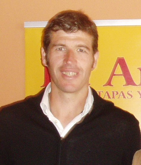 Enrique Fernández Romero es un ex futbolista español cuya posición era lateral izquierdo. Nació en Jerez de la Frontera el 23 de junio de 1971. Jugó en el C.D. Logroñés, Valencia CF, Real Mallorca, Deportivo La Coruña y Real Betis. Participó en la Copa Mundial de Fútbol de 2006.